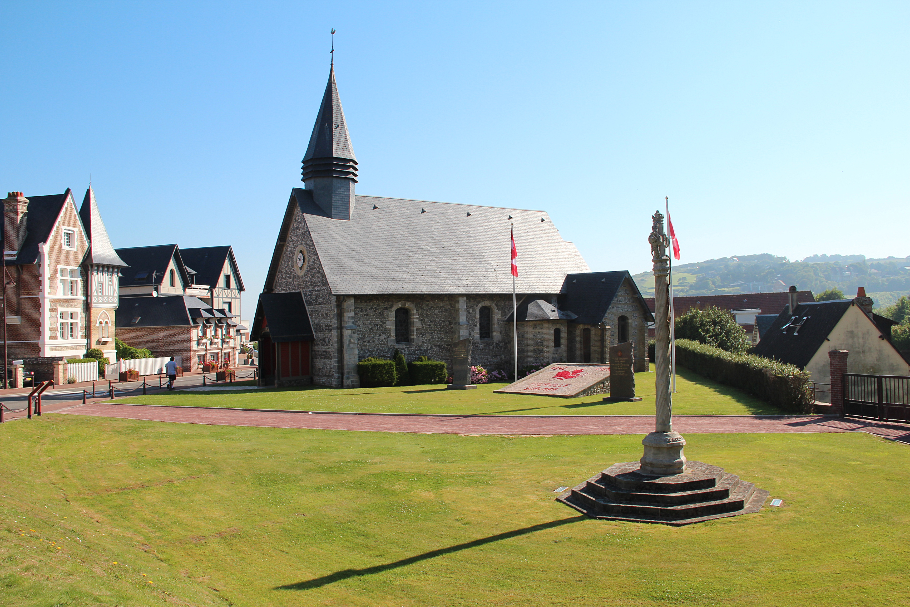 Pourville-sur-mer hameau de la commune de Hautot-sur-Mer (Seine-Maritime) - France, le quartier de la chapelle et du calvaire (1546).